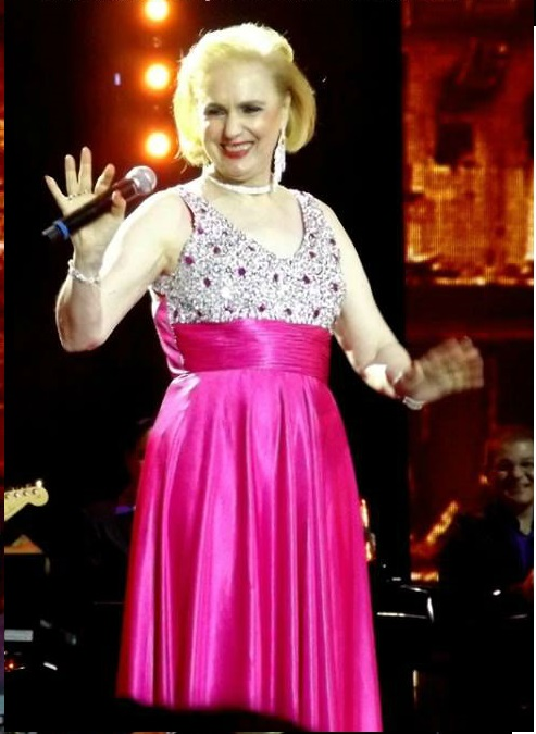 Elizabeth Moisés no Dvd Heróis em 2015